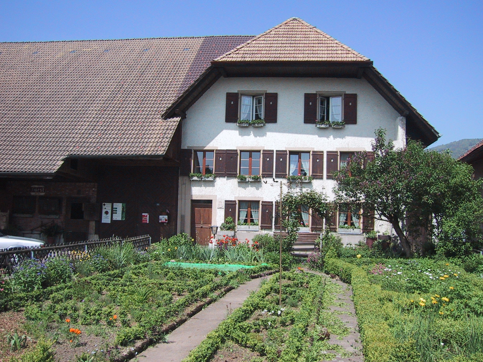 Aufnahme 20. Mai 2005, Gunzgen an der Hauptstrasse. Fotograf Peter Berger (selbst fotografiert). Lizenzstatus "GNU-FDL"